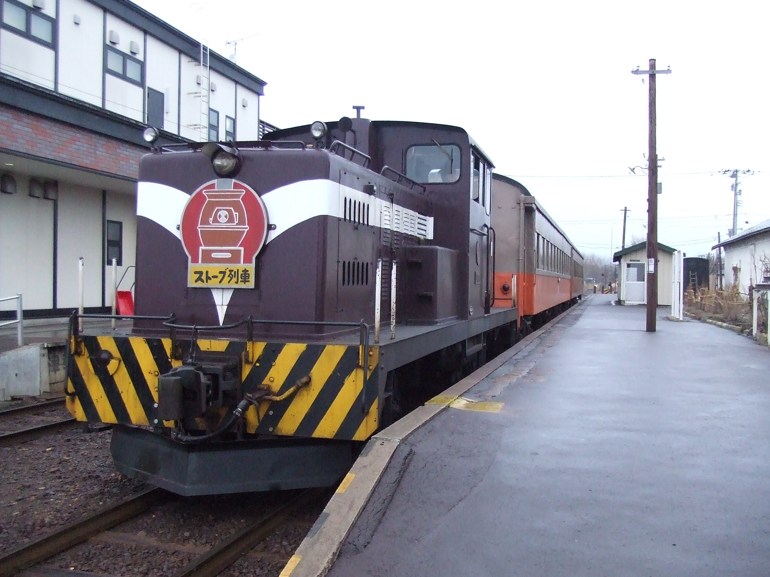 金木駅に停車するストーブ列車